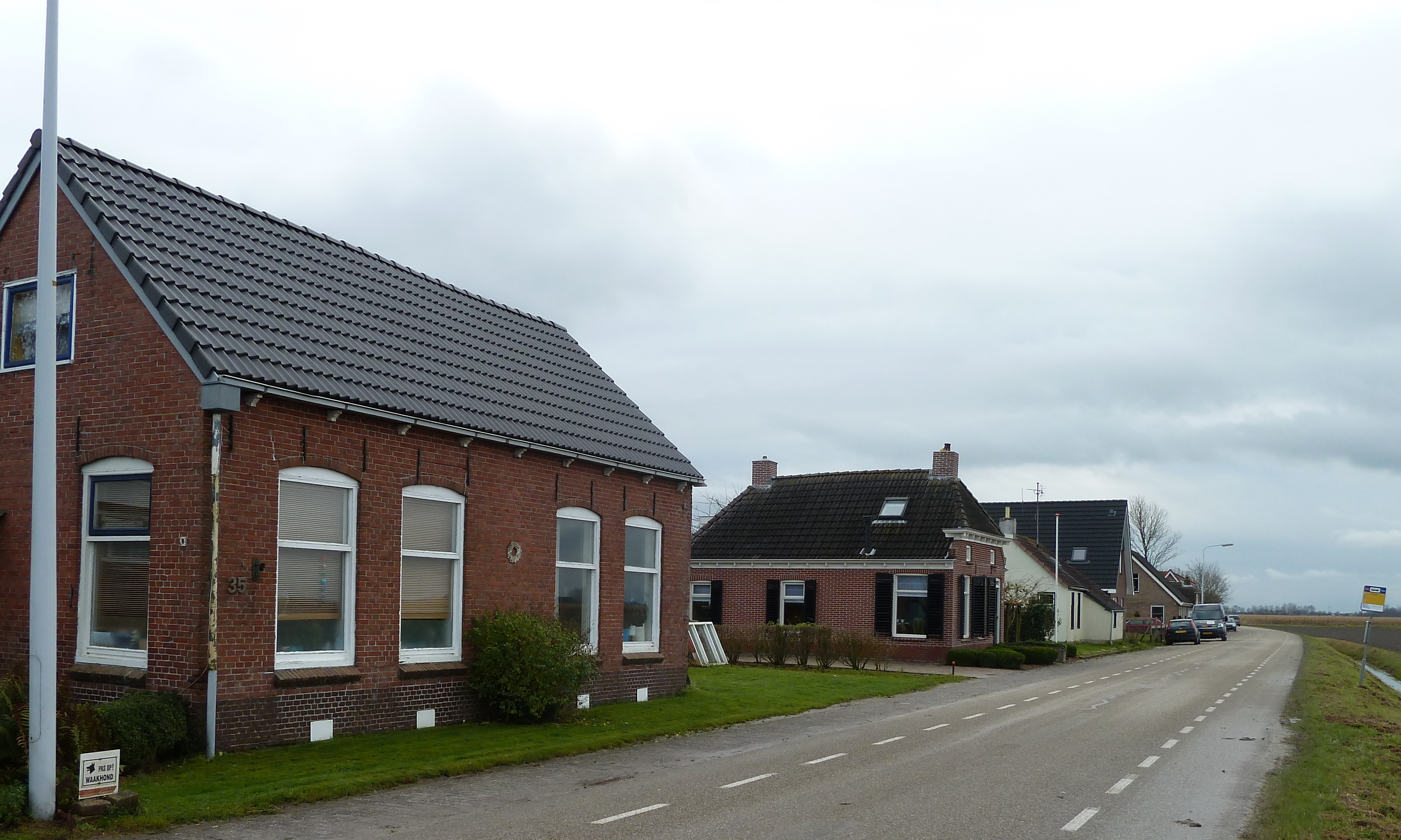 Huizen in het buurtschap Krabburen in de Friese gemeente Kollumerland en Nieuwkruisland.